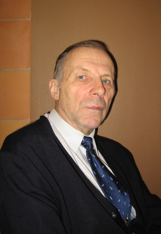 Pohjois-Haaga